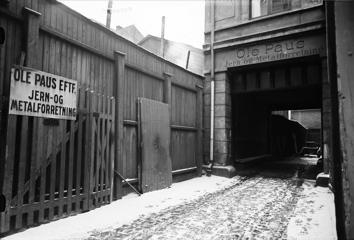 Ole Paus Jern- og Metalforretning, Nygata 3, Oslo